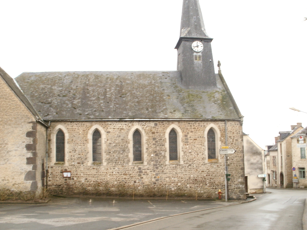 Photo de l'église de Saint-Georges-le-Gaultier, commune de la Sarthe.